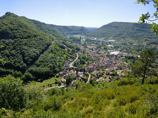 Vue de Beure